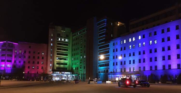 Hôpital de Chicoutimi aux couleurs de ça va bien aller.